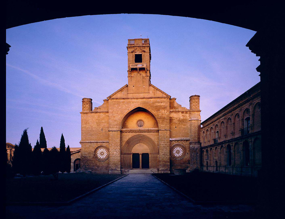 unidentified Spain